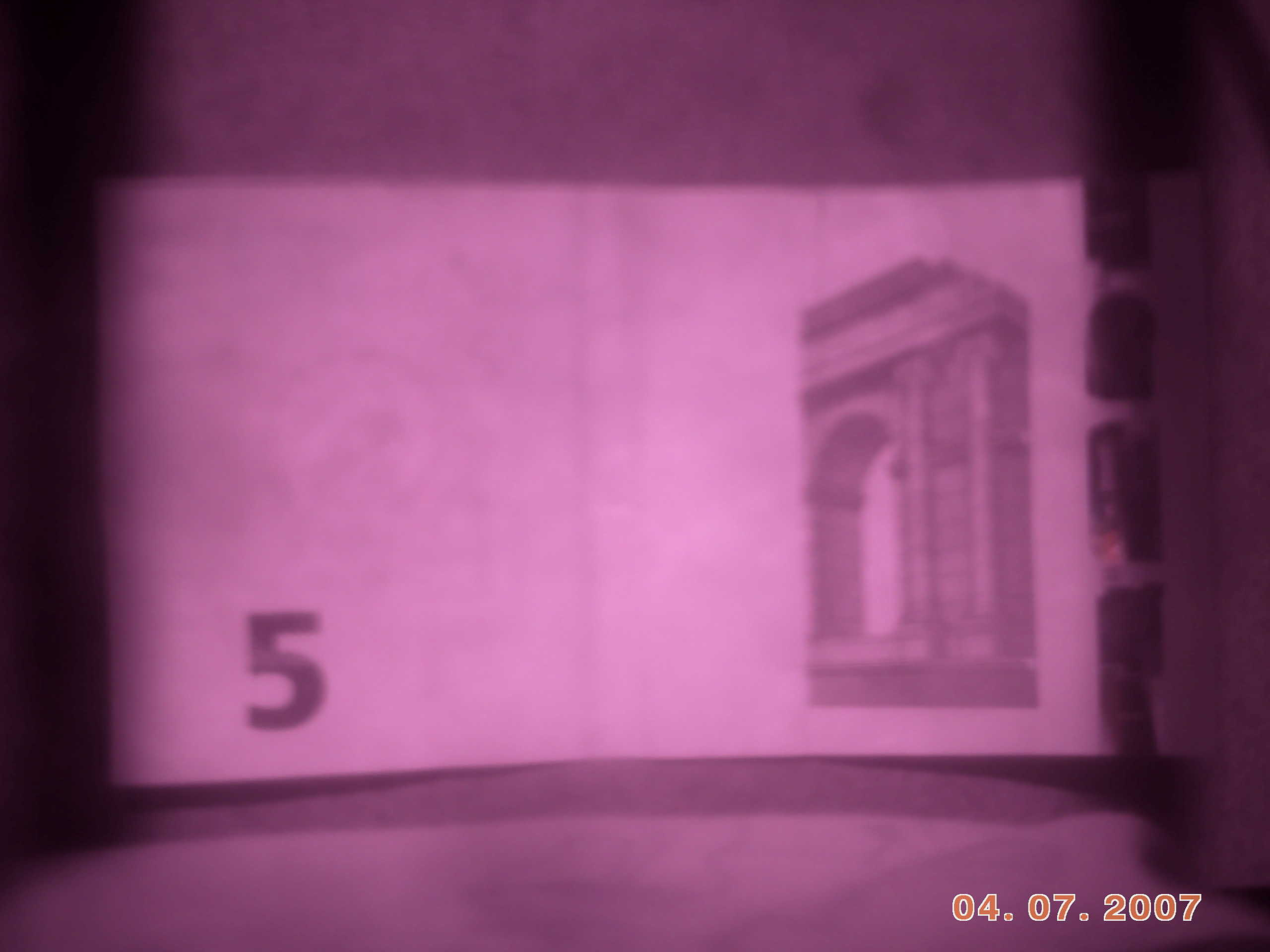 billete nuevo (2013) de 5 euros bajo IR cercano.